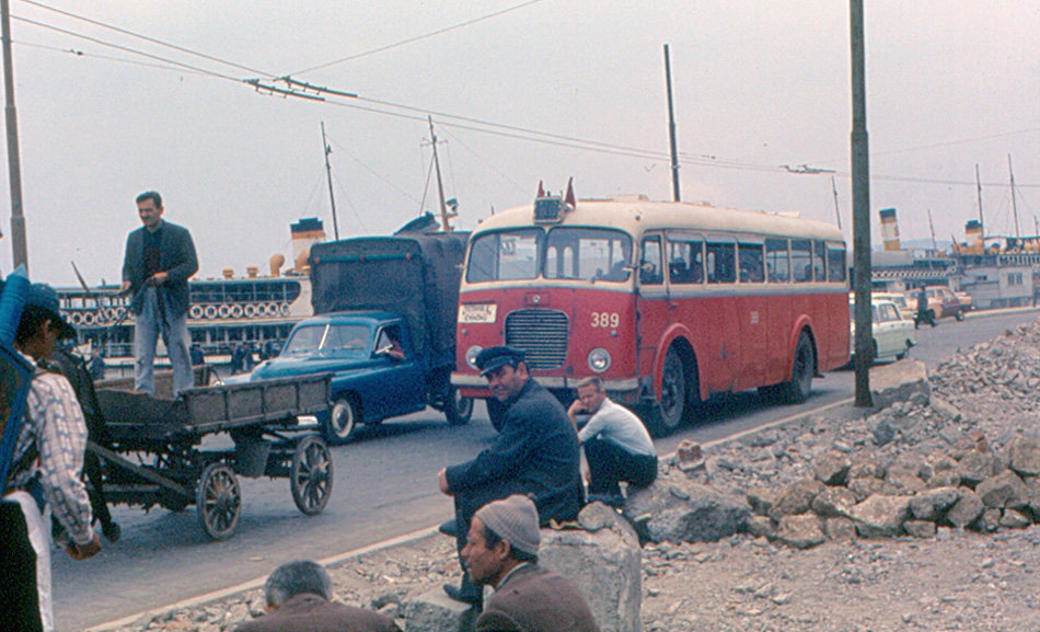 İstanbul 1967 senesi